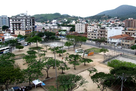 Vista superior da Praça Saiqui, situada no bairro carioca da Vila Valqueire, no estado brasileiro do Rio de Janeiro.